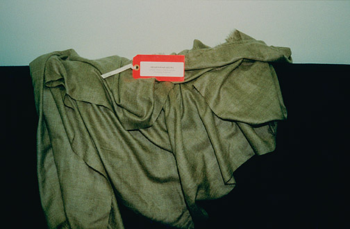 Shahtoosh Shawl